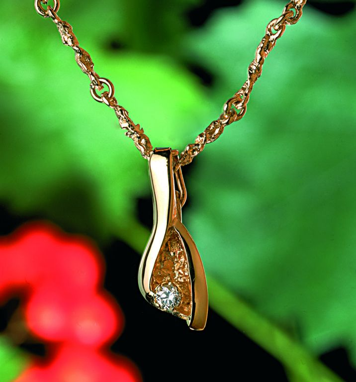 Halsband designat och tillverkat av Arne Blomberg för kollektionen Nature of Sweden. Fotograf Per Johansson för Hans Wagner